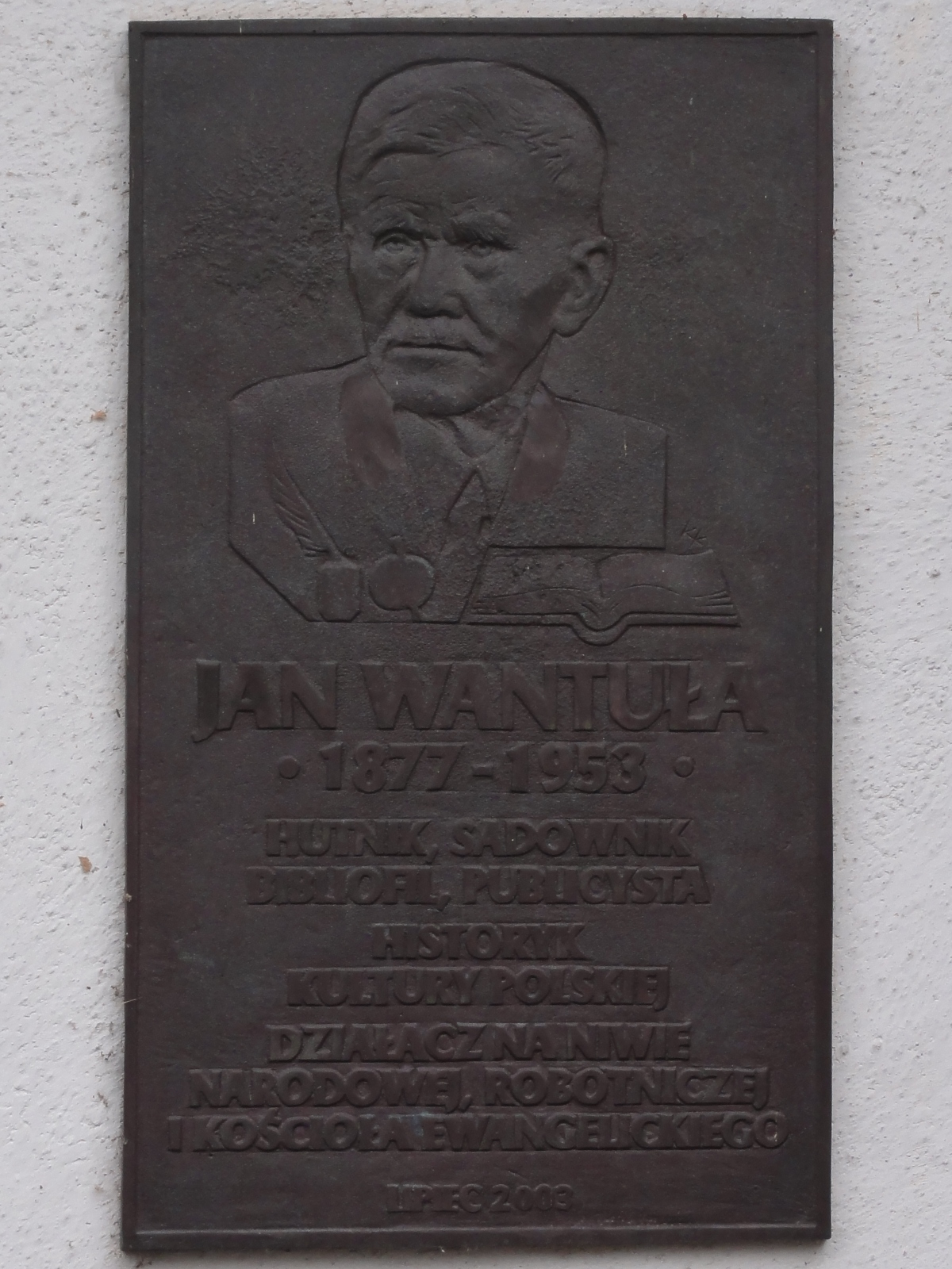 Tabliczka Jana Wantuły na budynku Muzeum Ustrońskiego